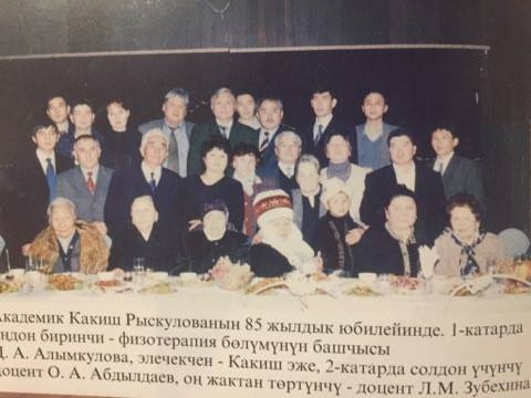 Юбилей 85 летия Какиш Рыскуловой